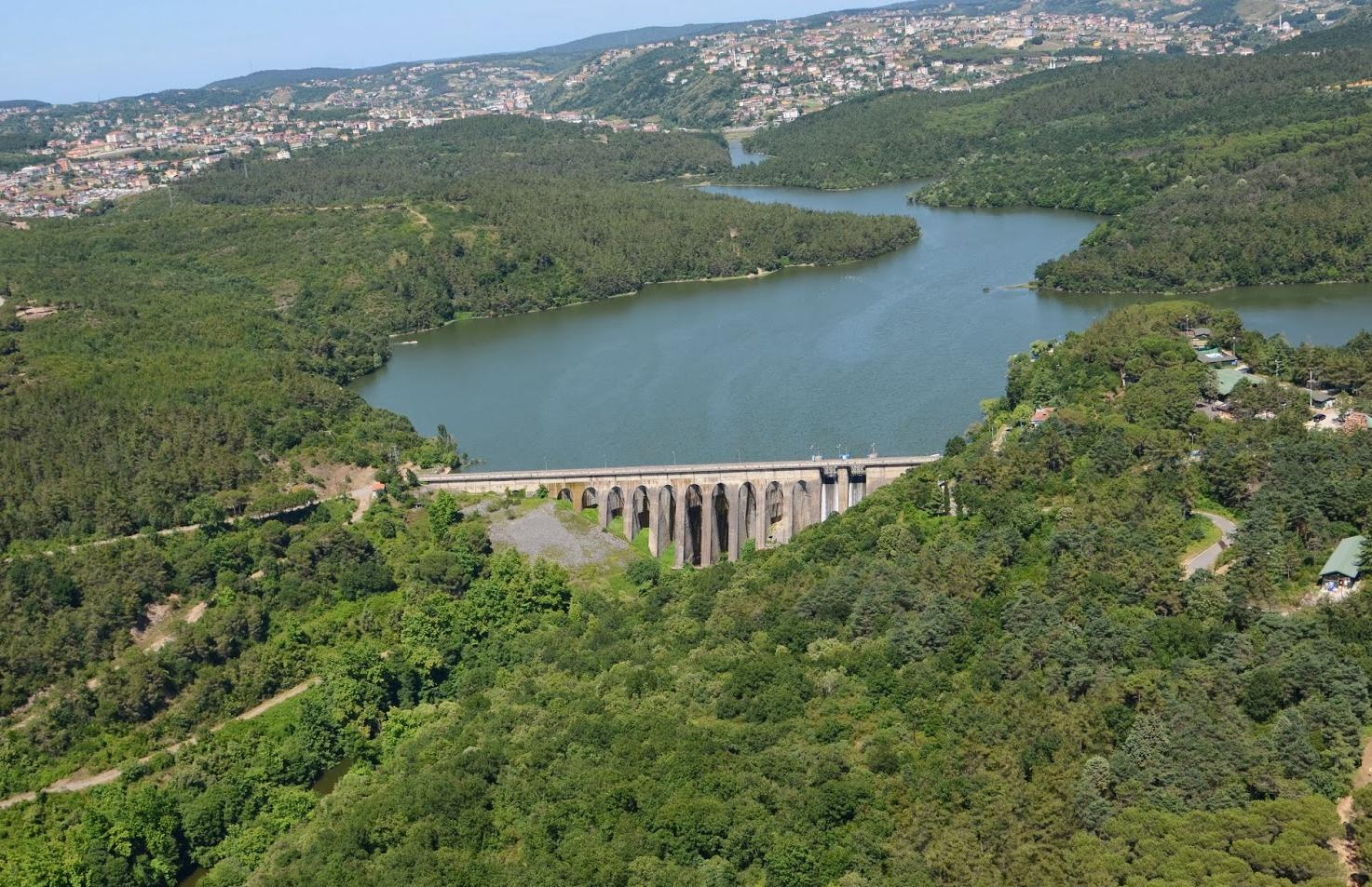 Beykoz'da bulunan bir baraj.